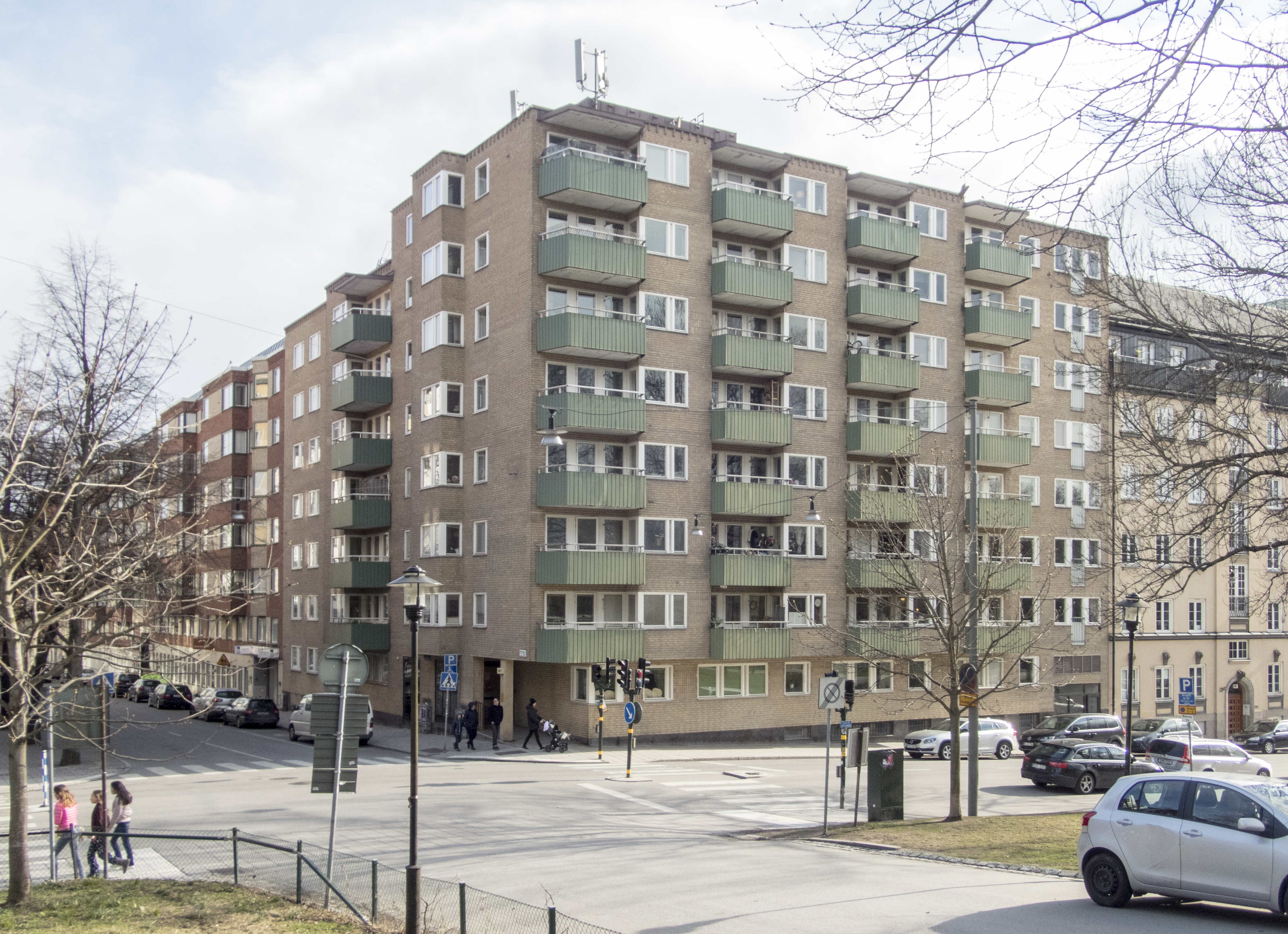 Killingen 25, Döbelnsgatan 97 Frejgatan Stockholm Nybyggnadsår 1973 - 1974 AB Stockholmshem (Byggherre) AB Stockholmshem (Byggmästare) Alfreds & Larsén Arkitektkontor AB (Arkitekt) Byggnads AB / Reinhold Gustafsson (Byggmästare) Reinhold Gustafssons Byggnads AB (Byggherre)